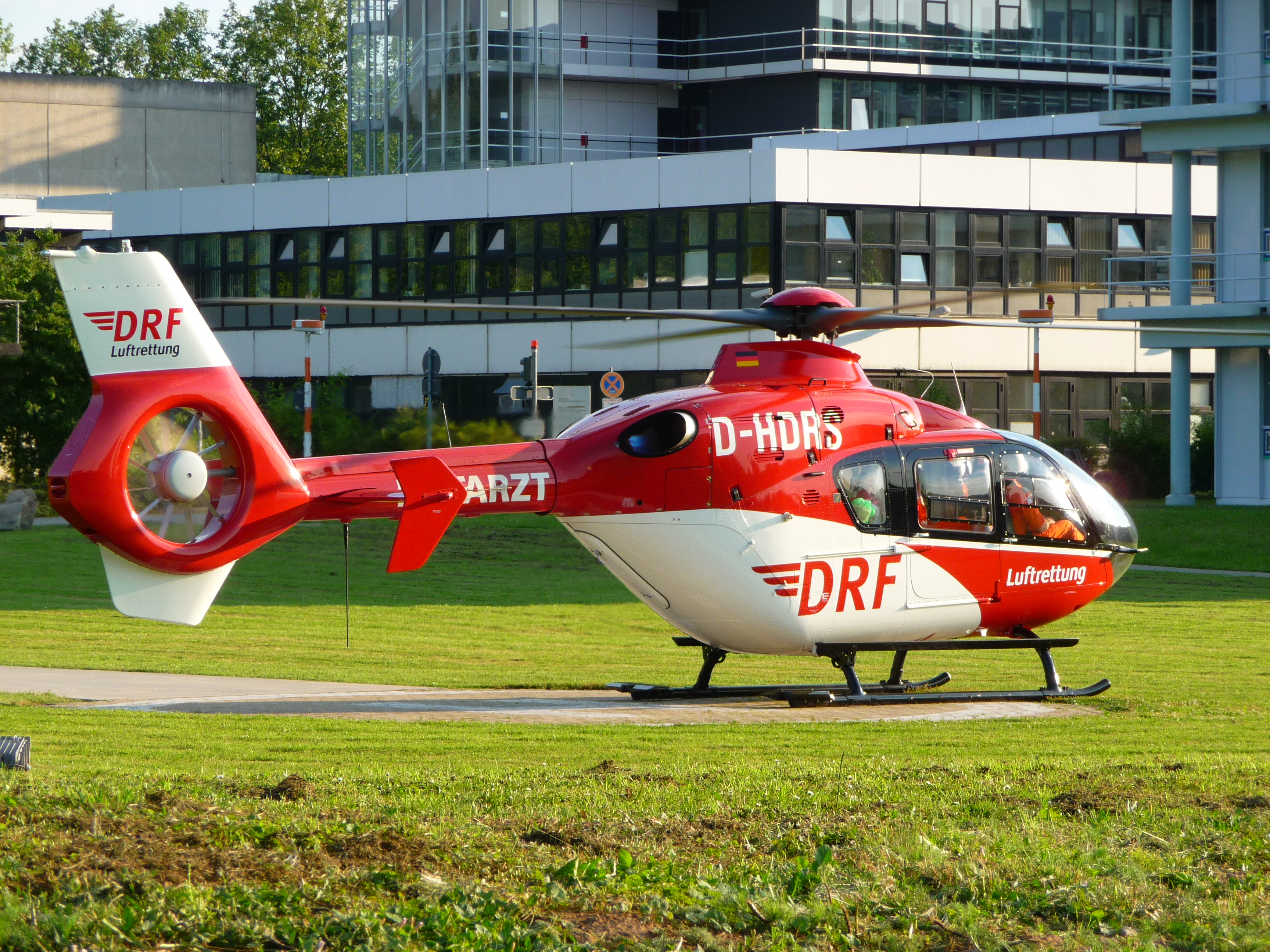 Hubschrauber EC 135 P2+ der DRF Luftrettung nach Aufnahme eines Patienten kurz vor dem Start im Neuenheimer Feld in Heidelberg